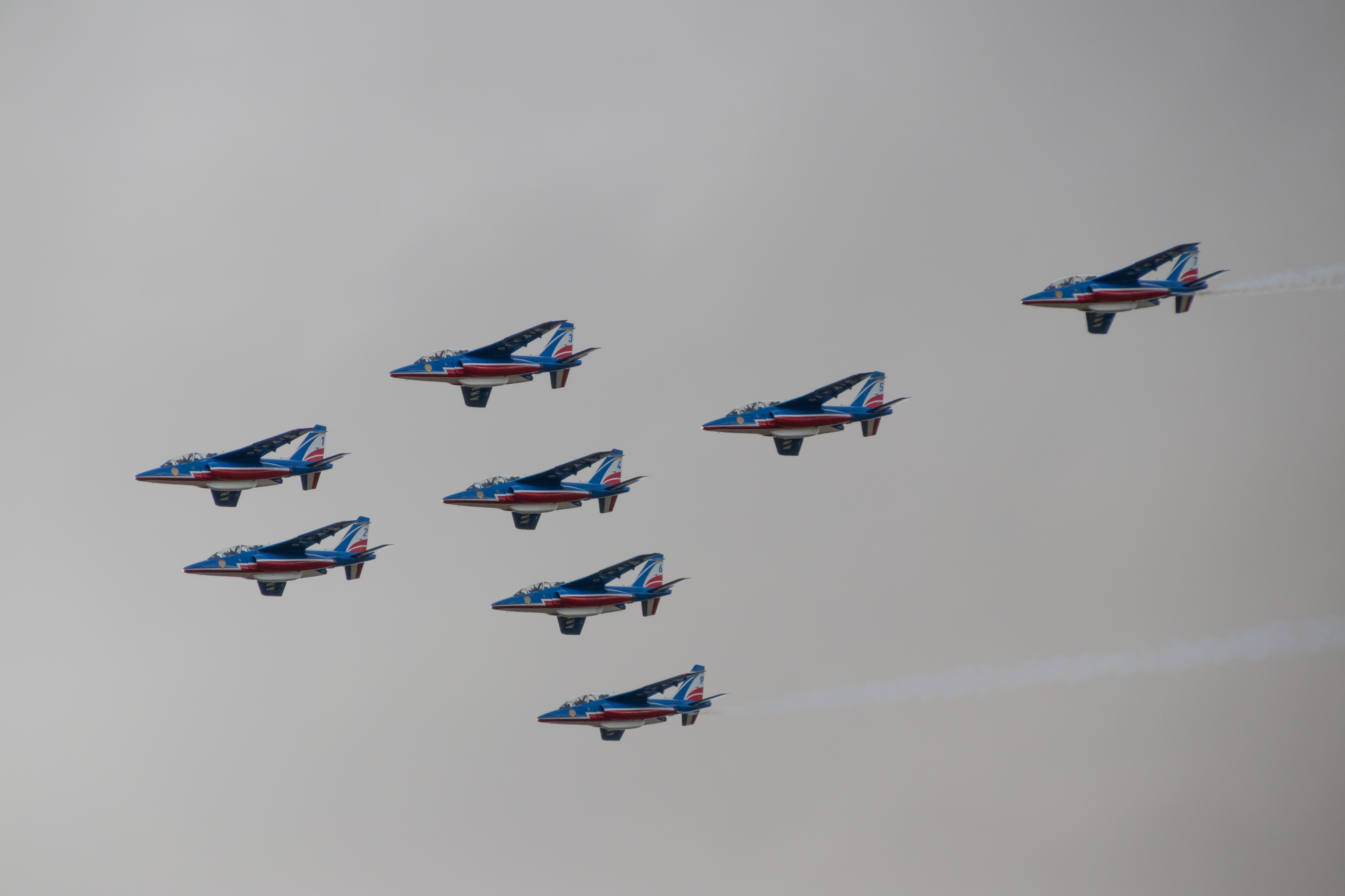 Passage de la Patrouille de France au meeting de Roanne 2018.